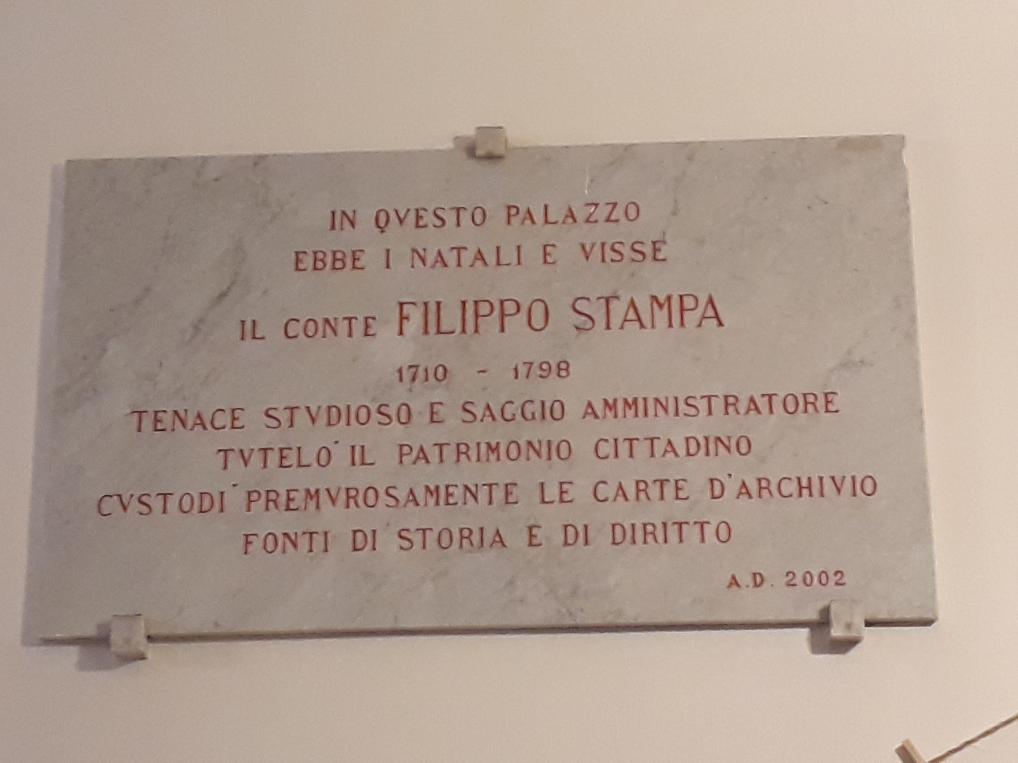 Epigrafe nel Municipio di Ferentino, costruito sull'area dell'antico Palazzo Stampa, distrutto nella seconda guerra mondiale.